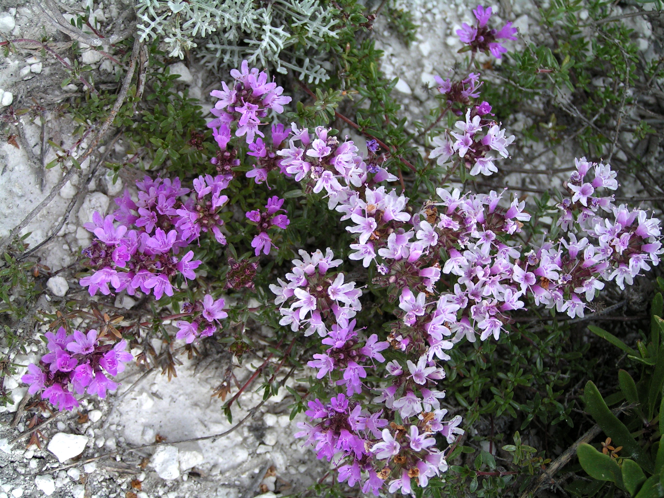 Крейдяні відслонення, Міловський район, неподалік від с. Стрільцівка